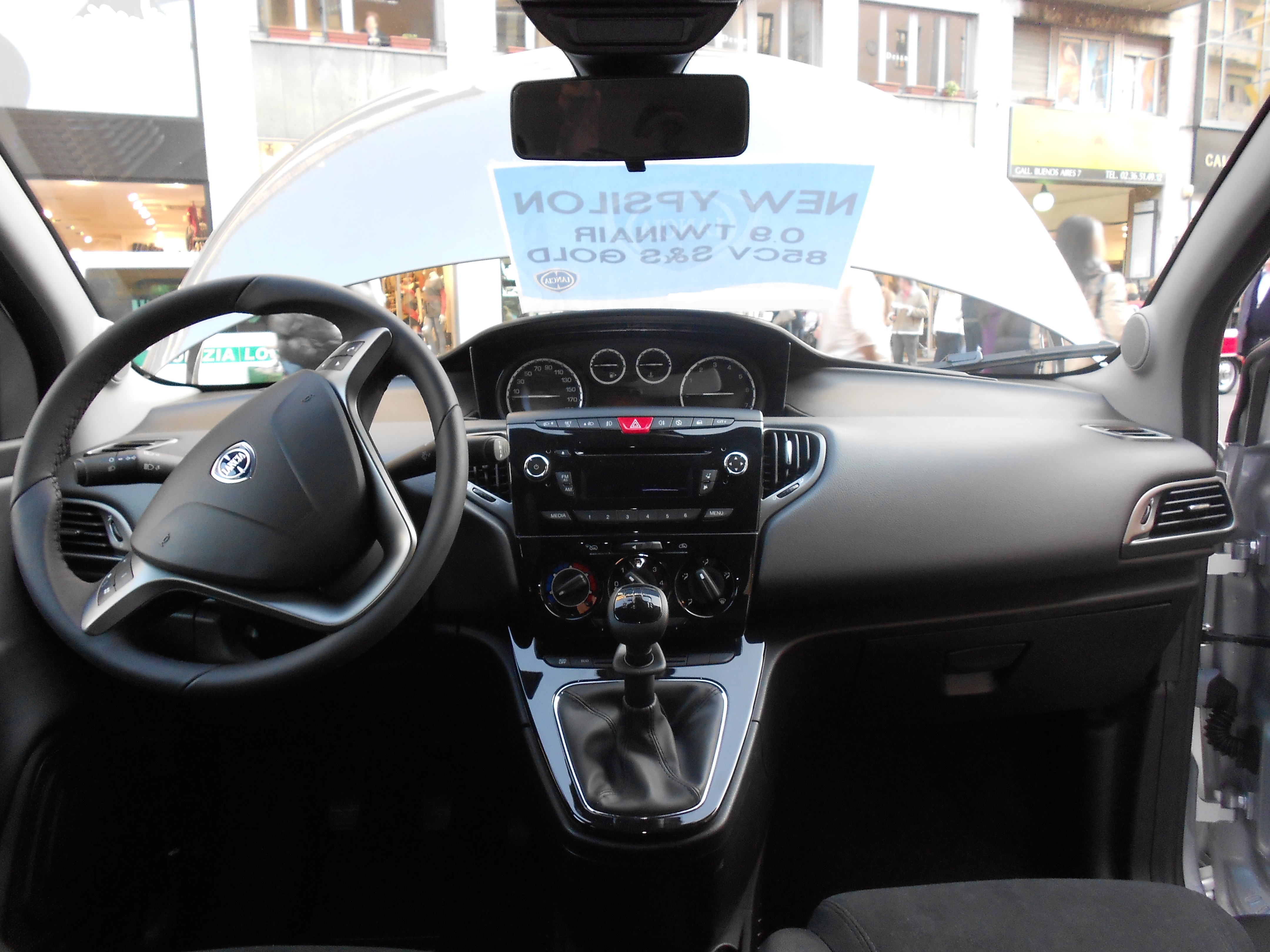 interni della nuova Lancia Ypsilon (2011) Foto scattata a Milano, Corso Buenos Aires Modello: Ypsilon (2011) Costruttore: Lancia Gruppo: Fiat Group